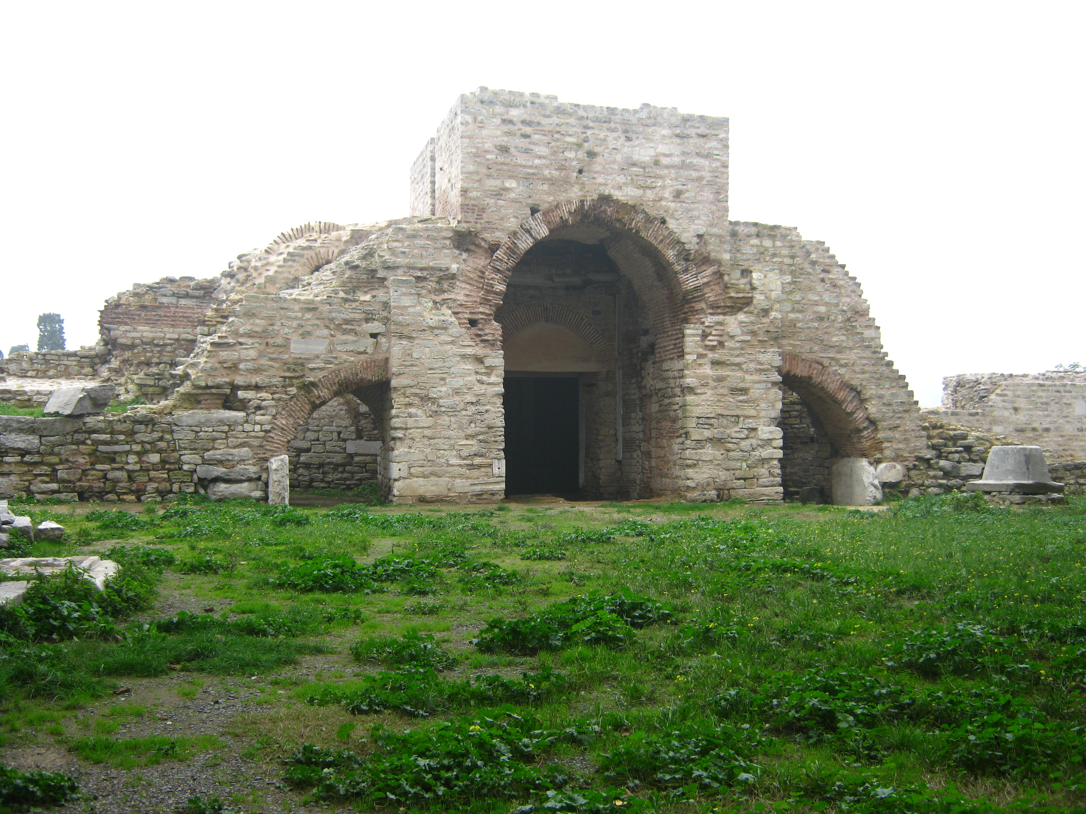 Yedikule Zindanları